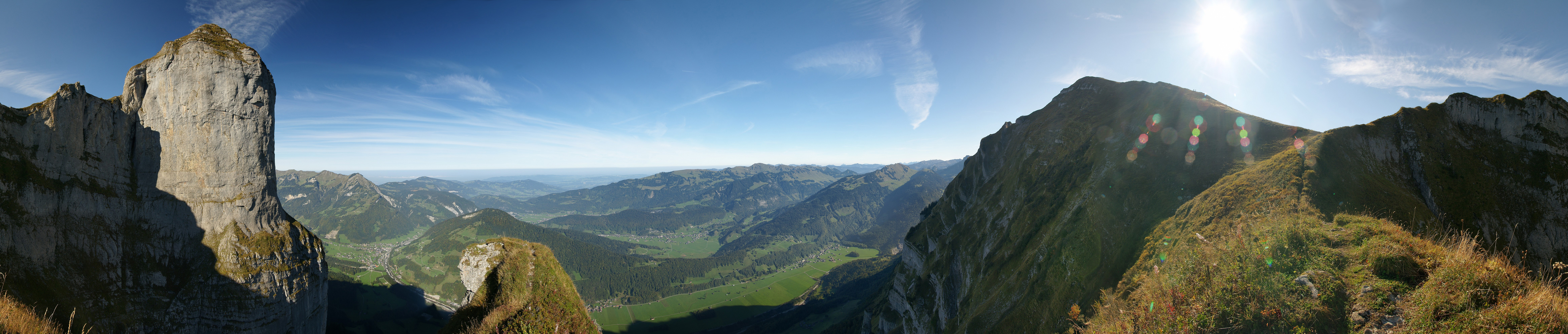 Panorama im Bregenzerwaldgebirge mit mehreren Bilder: Auf dem Weg zur Kanisfluh liegt zwischen der Platte und dem Kilkele eine Aussichtsplattform, die man nur bei trockenen Bodenverhältnissen begehen sollte. Schwindelfreiheit und Trittsicherheit ist hier zwingend erforderlich. Das Bild zeigt einen Großteil der Ortschaften des Vorderen- und Mittleren Bregenzerwaldes. Links im Tal liegt Mellau im mittleren Bildgrund Hirschau und rechts unten Schnepfau. Blickt man über die Schnepfegg sieht man die Orte Bizau und Bezau. Im Hintergrund erkennt man die Gemeinde Schwarzenberg. Der Gebirgskamm in der hinteren Bildmitte zeigt die Nagelfluhkette der Allgäuer Alpen.